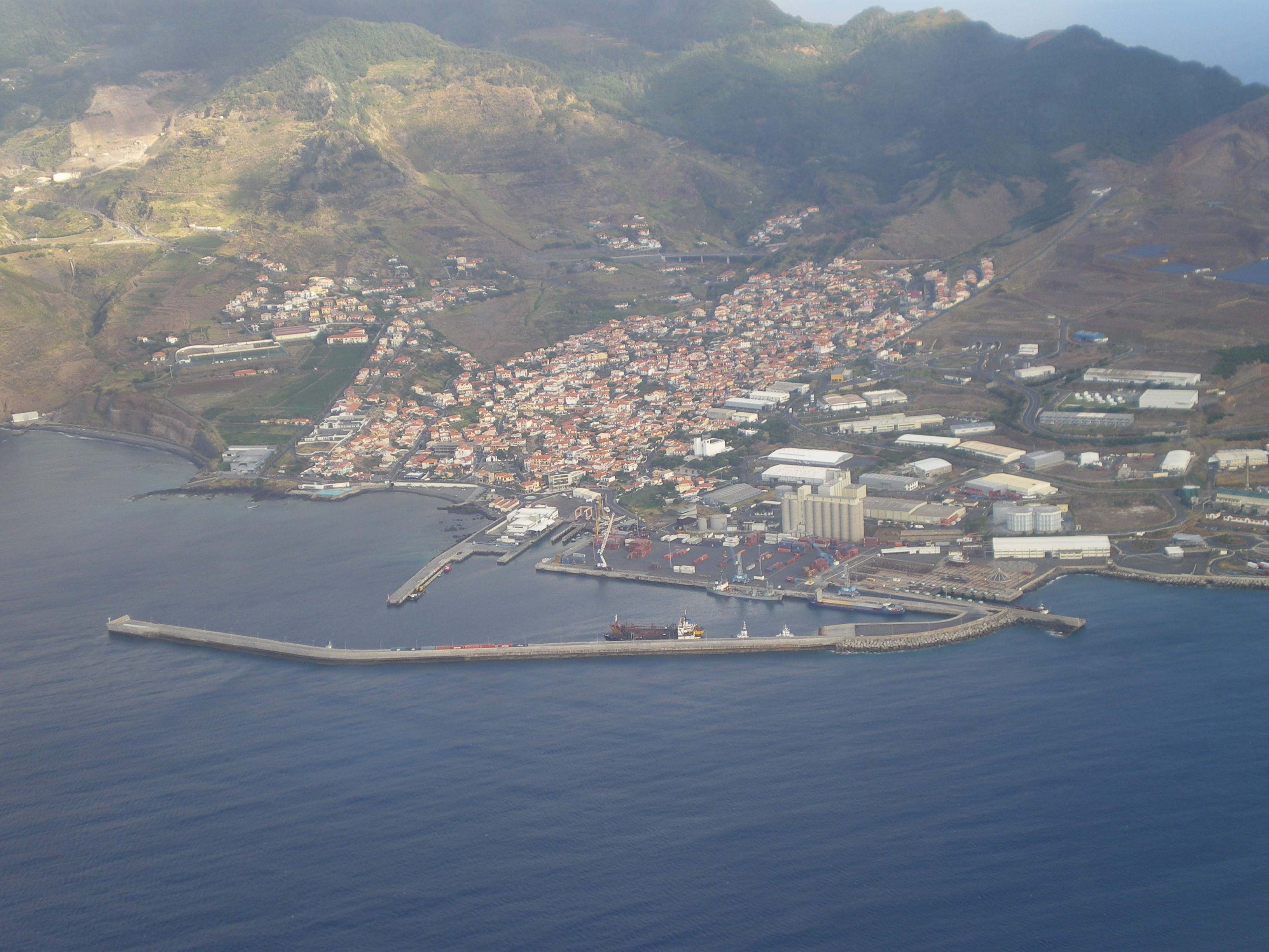 Luftaufnahme von Canical